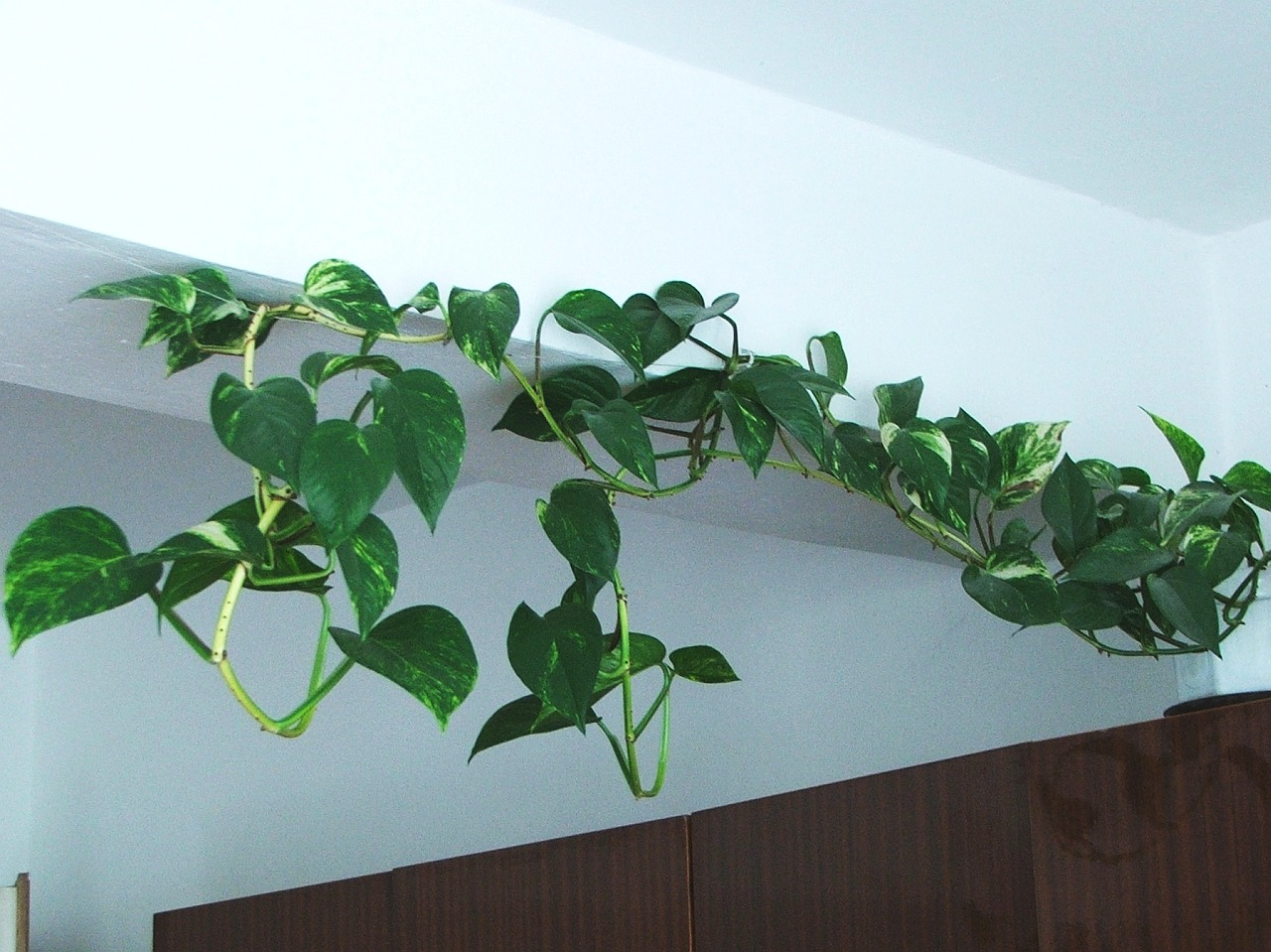 Epipremum aureum